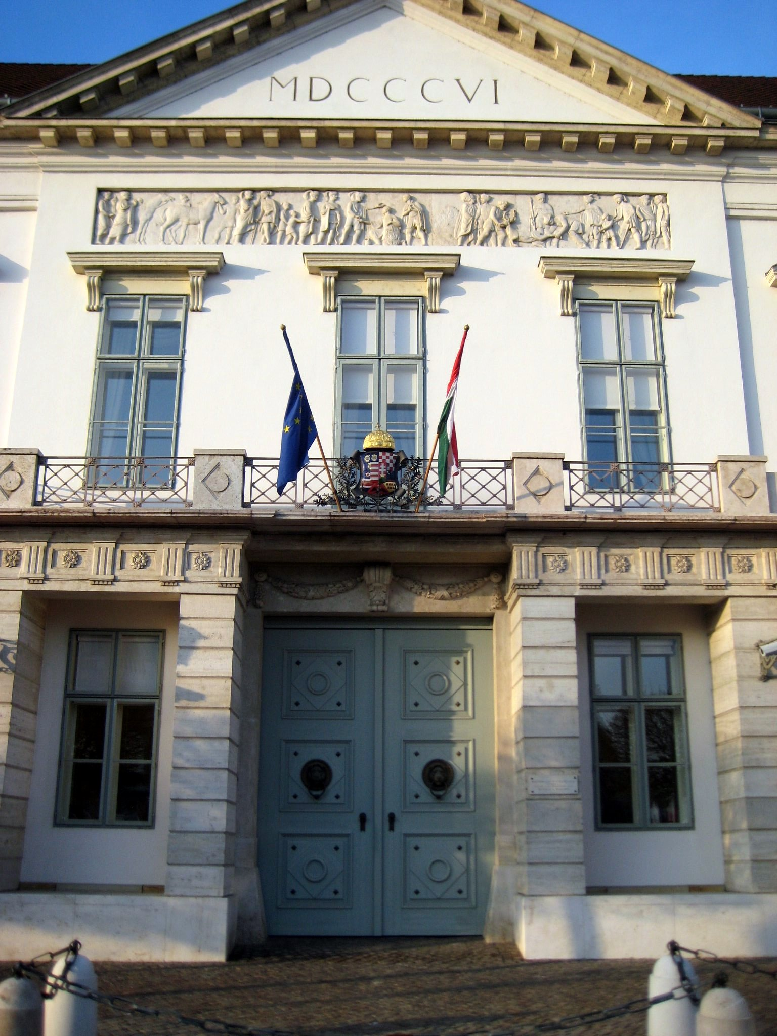 Presidential Palace